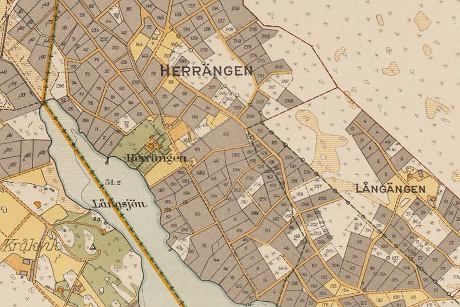 Herrängen karta 1920-1930 (del av 1934 års karta över Stockholm med omgivningar)